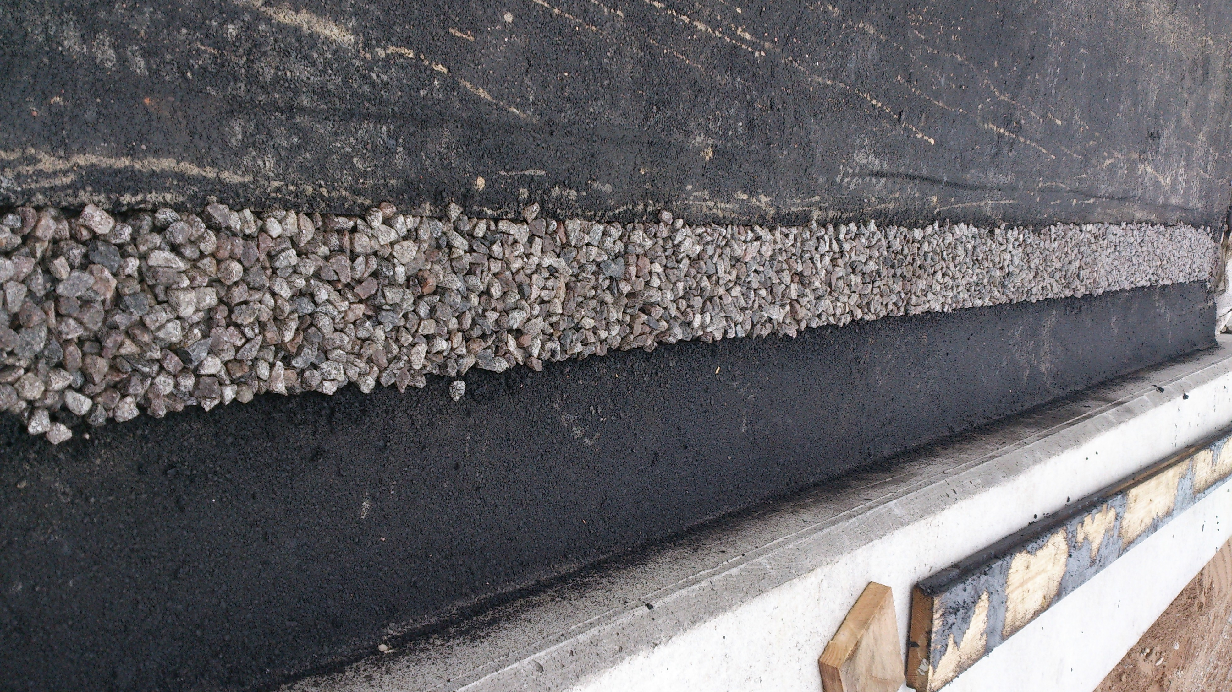 Asfaldist läbiimuvat vett koguv ja tilktorudesse suunav salaoja Idaringtee viaduktil Lammi tee juures, 14. mai 2014